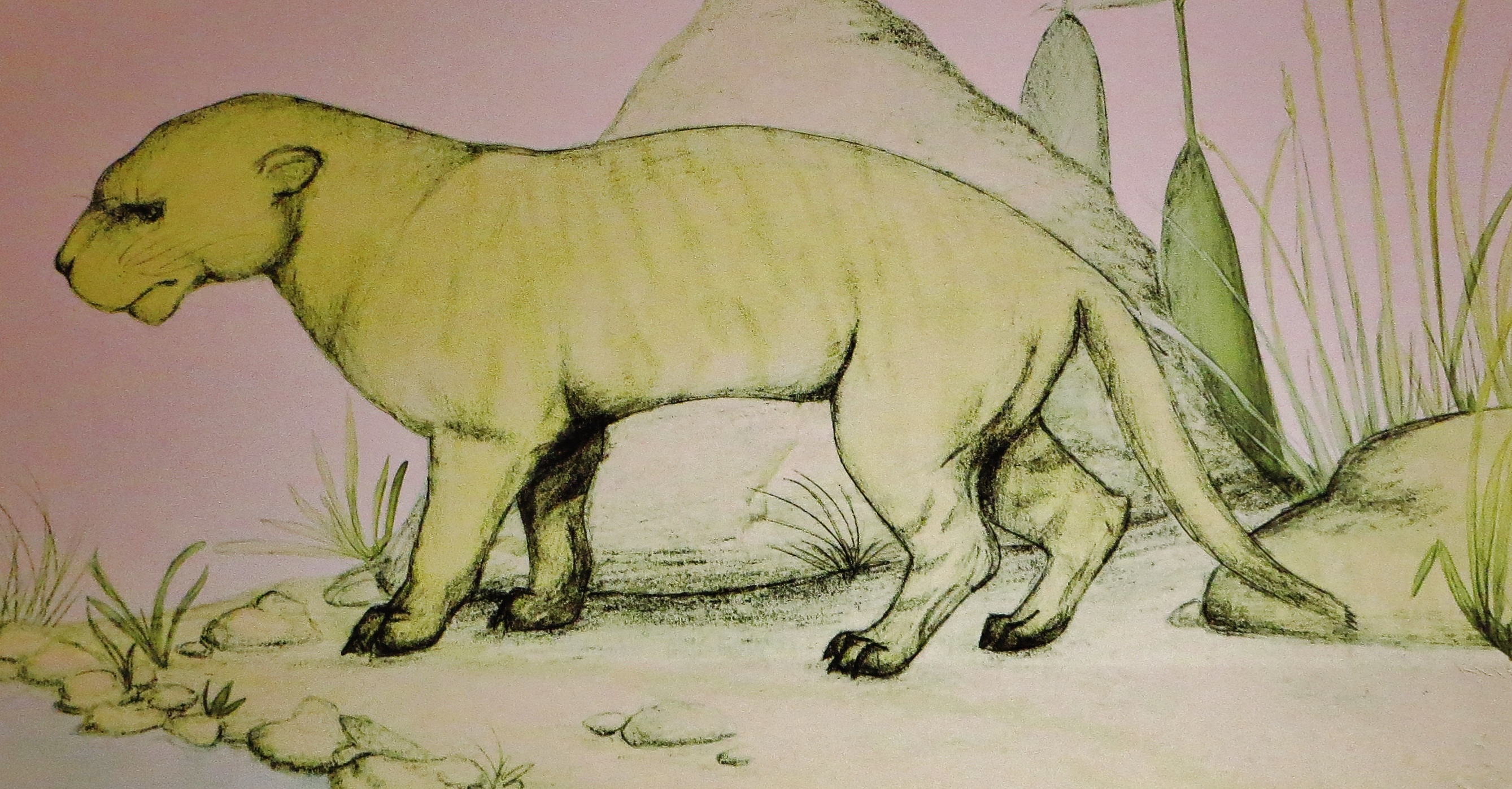 Restoration - Took the picture at Museum of Natural History, Karlsruhe